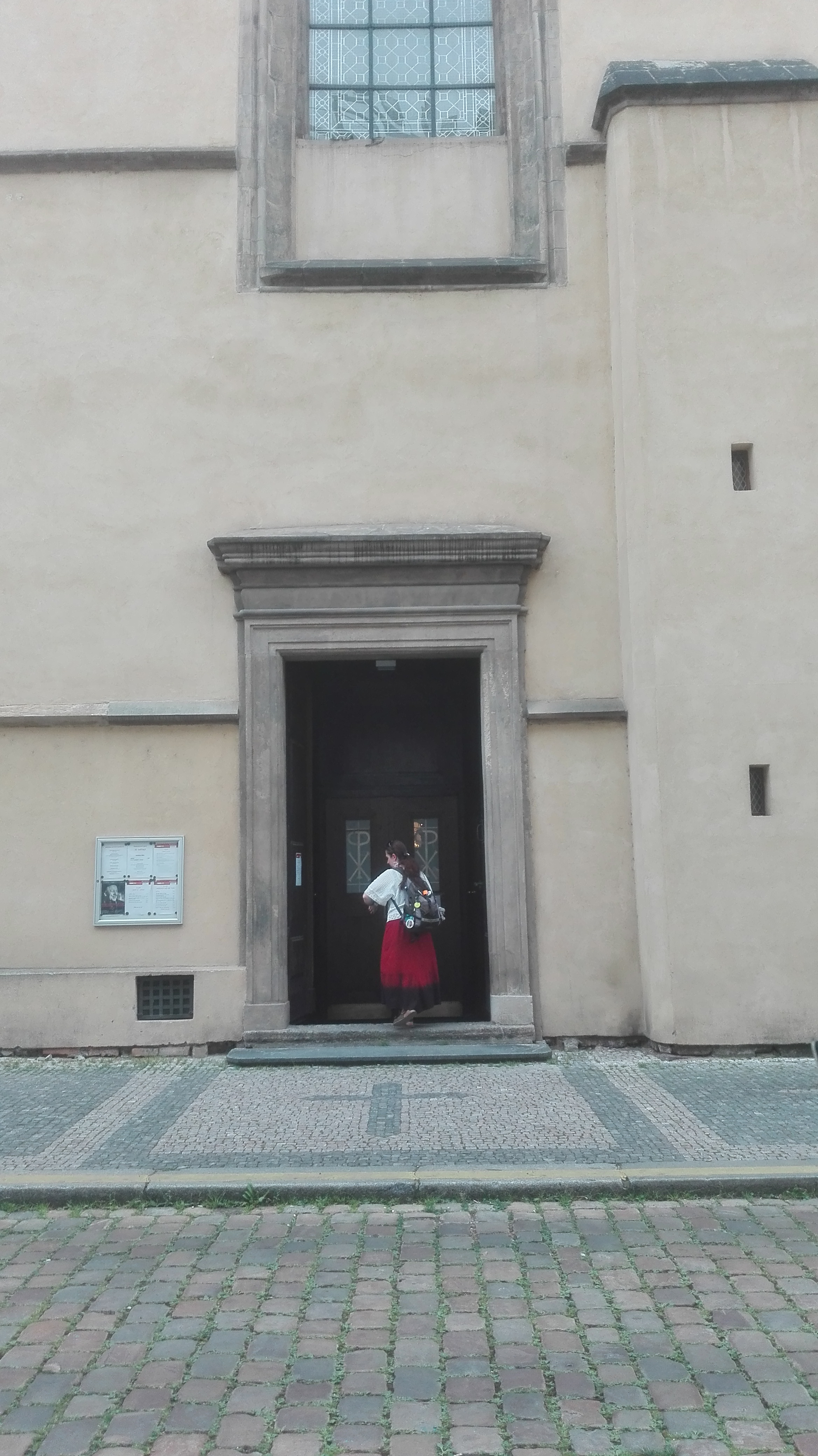 portál vstupu